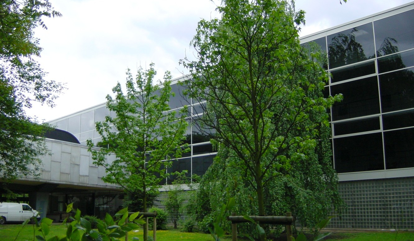 Description: Fachhochschule Niederrhein, Frankenring, Krefeld Date: 22.5.2006 Author: DER UNFASSBARE